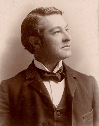 François-Xavier Lemieux (Quebec MLA)